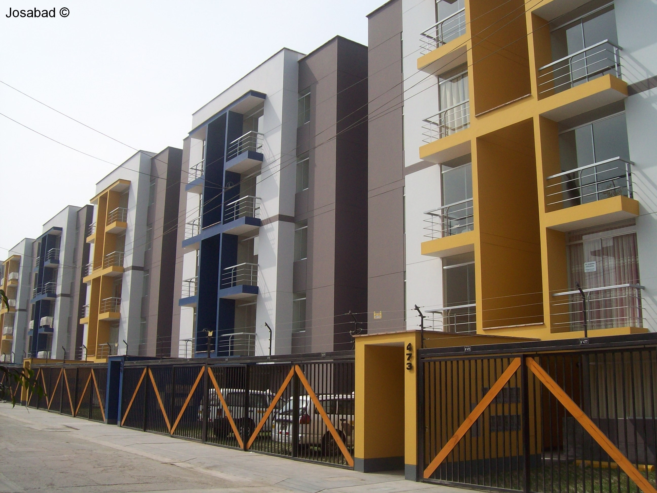 Edificio multifamiliar en el jirón Don Bosco.